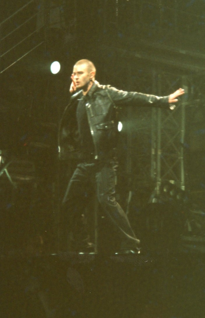 El cantante estadounidense Justin Timberlake dando un show en el Earls Court Exhibition Centre de Londres, Inglaterra, con motivo de su gira musical Justified World Tour en 2003-2004.